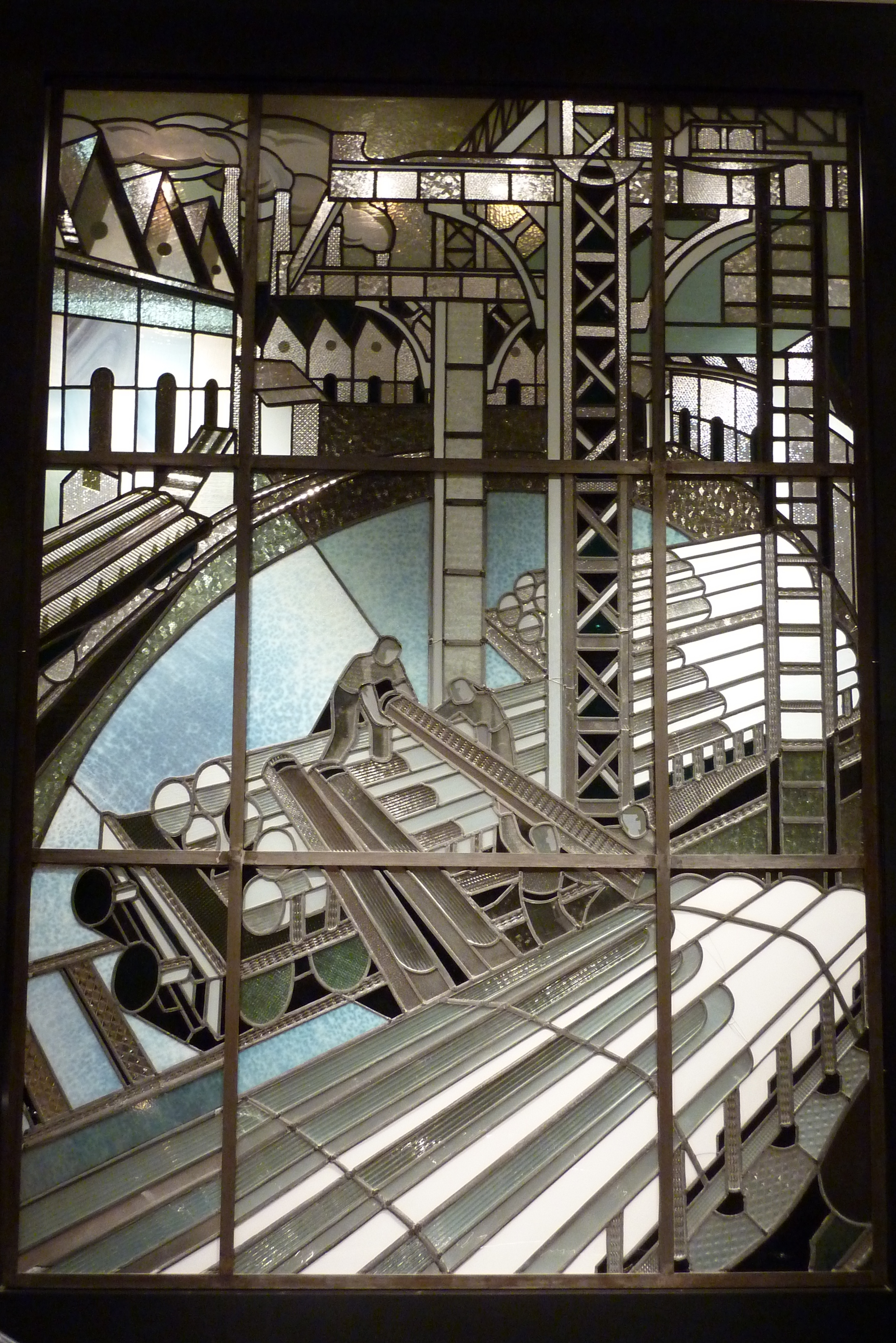 Bleiglasfenster in der Sammlung des Musée des Arts Décoratifs in Paris; "Expédition des profilés par le chemin de fer" von Jacques Grüber (1870–1936), entstanden um 1930 in Nancy, ursprünglich im Haus "Aciéries de Paris et d'Outreau" in der 5, rue Jacques Bingen in Paris